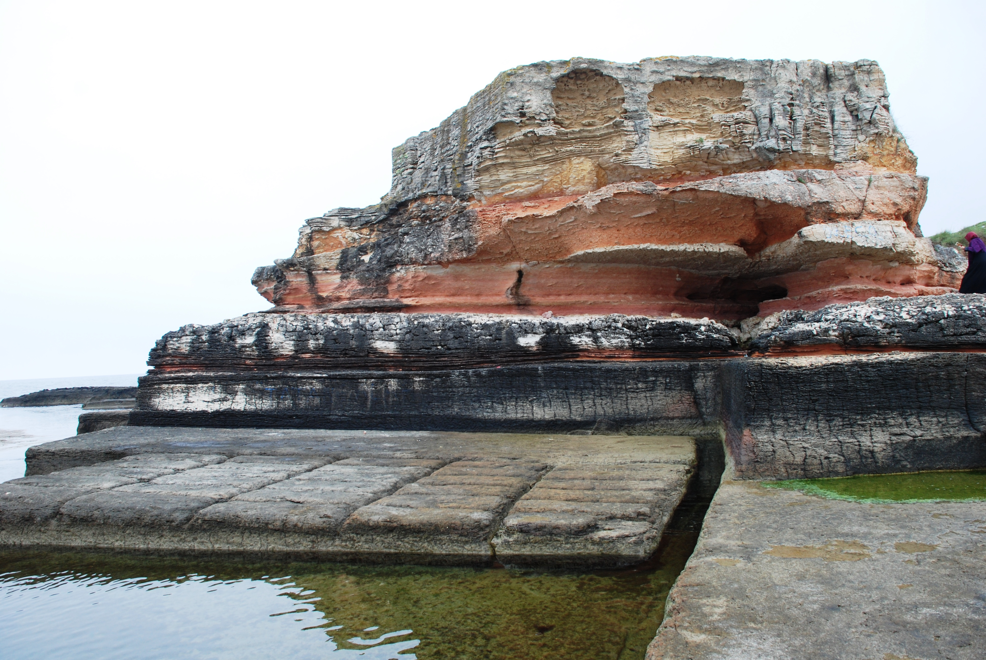 Kandıra, Kefken kıyılarında Osmanlılar zamanında taş ocağı olarak kullanılan alan